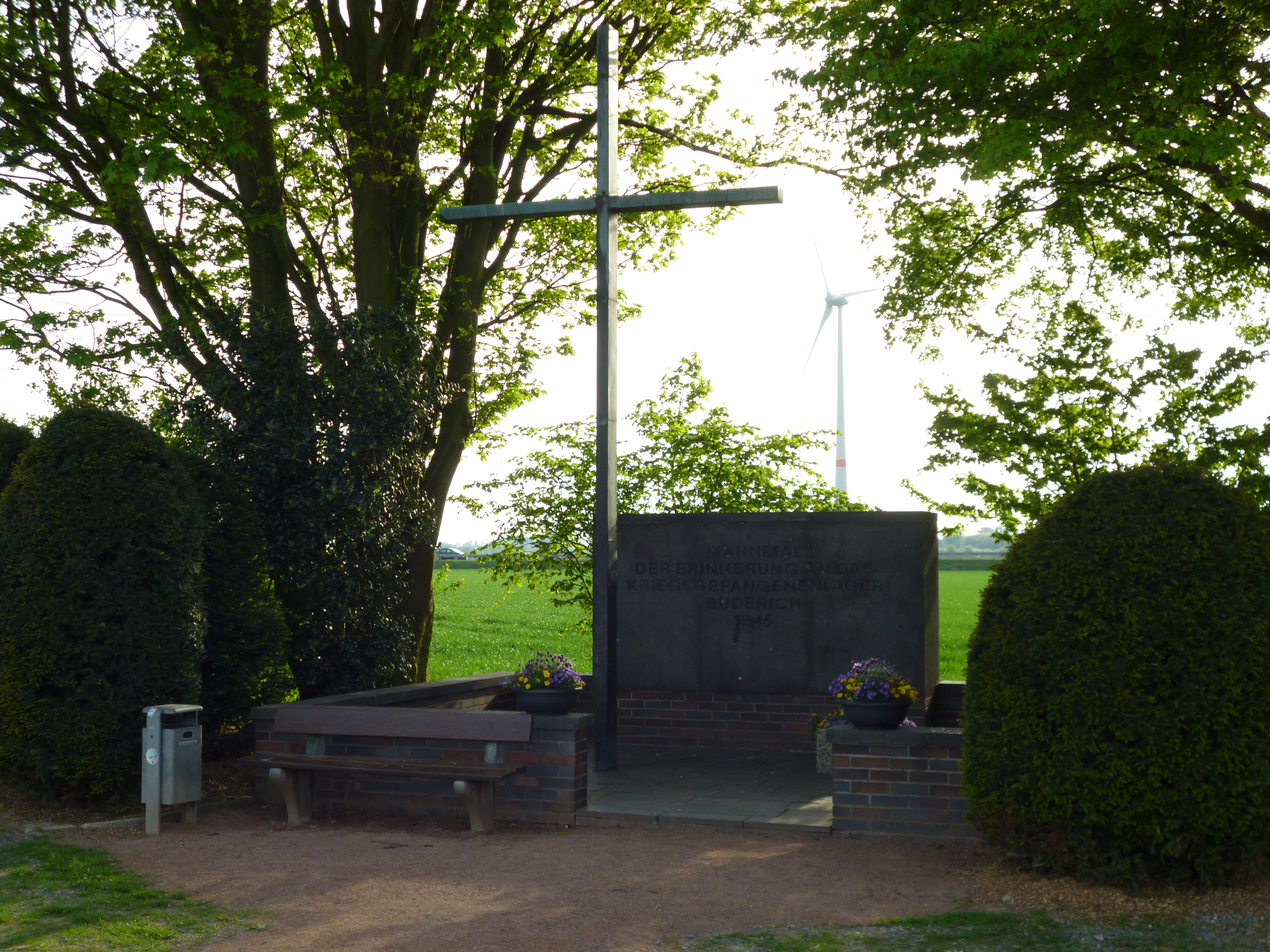 Foto des Mahnmals der Erinnerung an das Kriegsgefangenenlager Büderich 1945